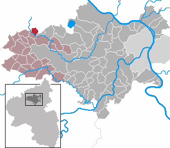 Hausten in Rhineland-Palatinate - district Mayen-Koblenz